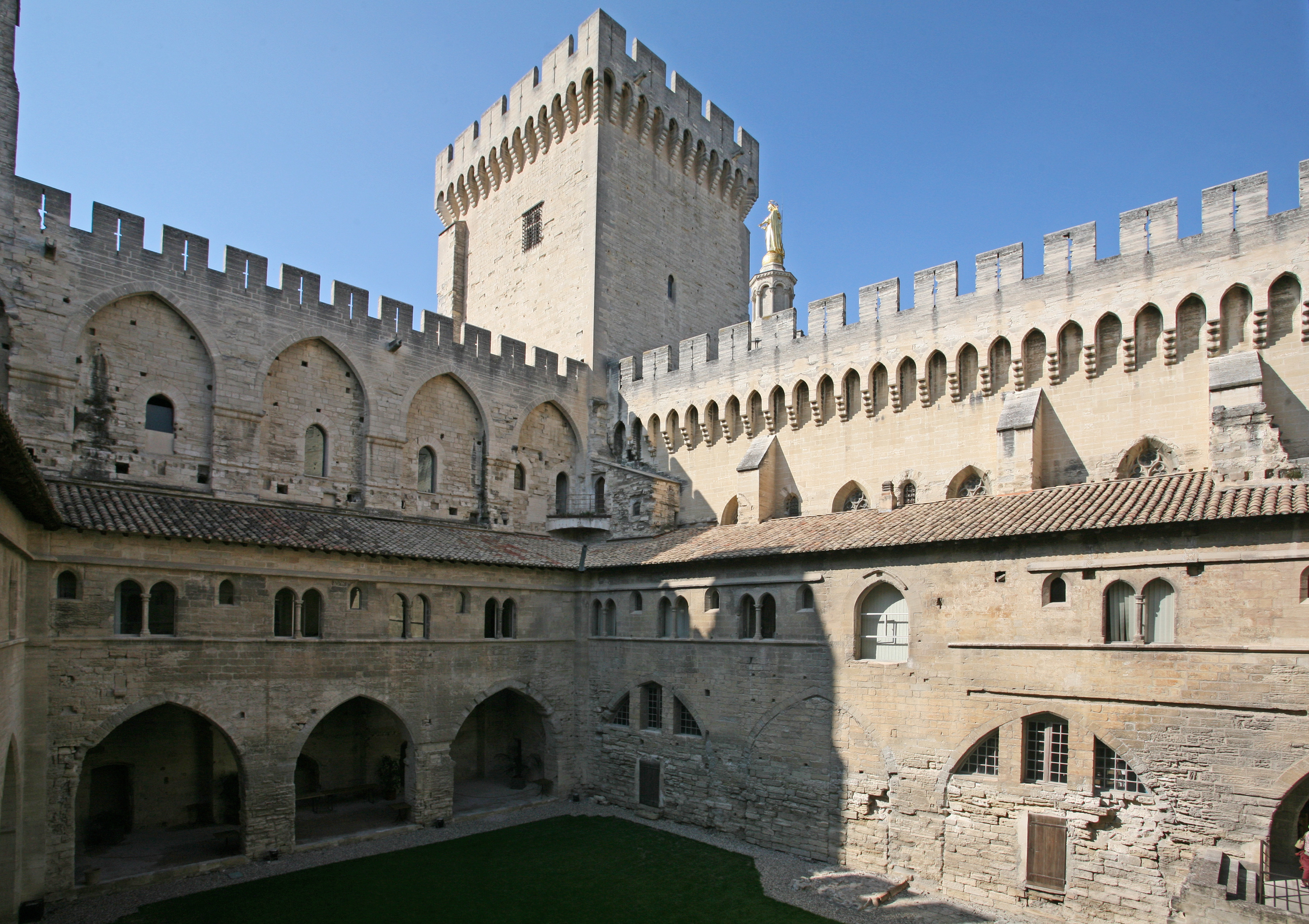 Tour de la campane + Cour du cloitre, vieux palais, Palais des Papes, Avignon, Vaucluse, France